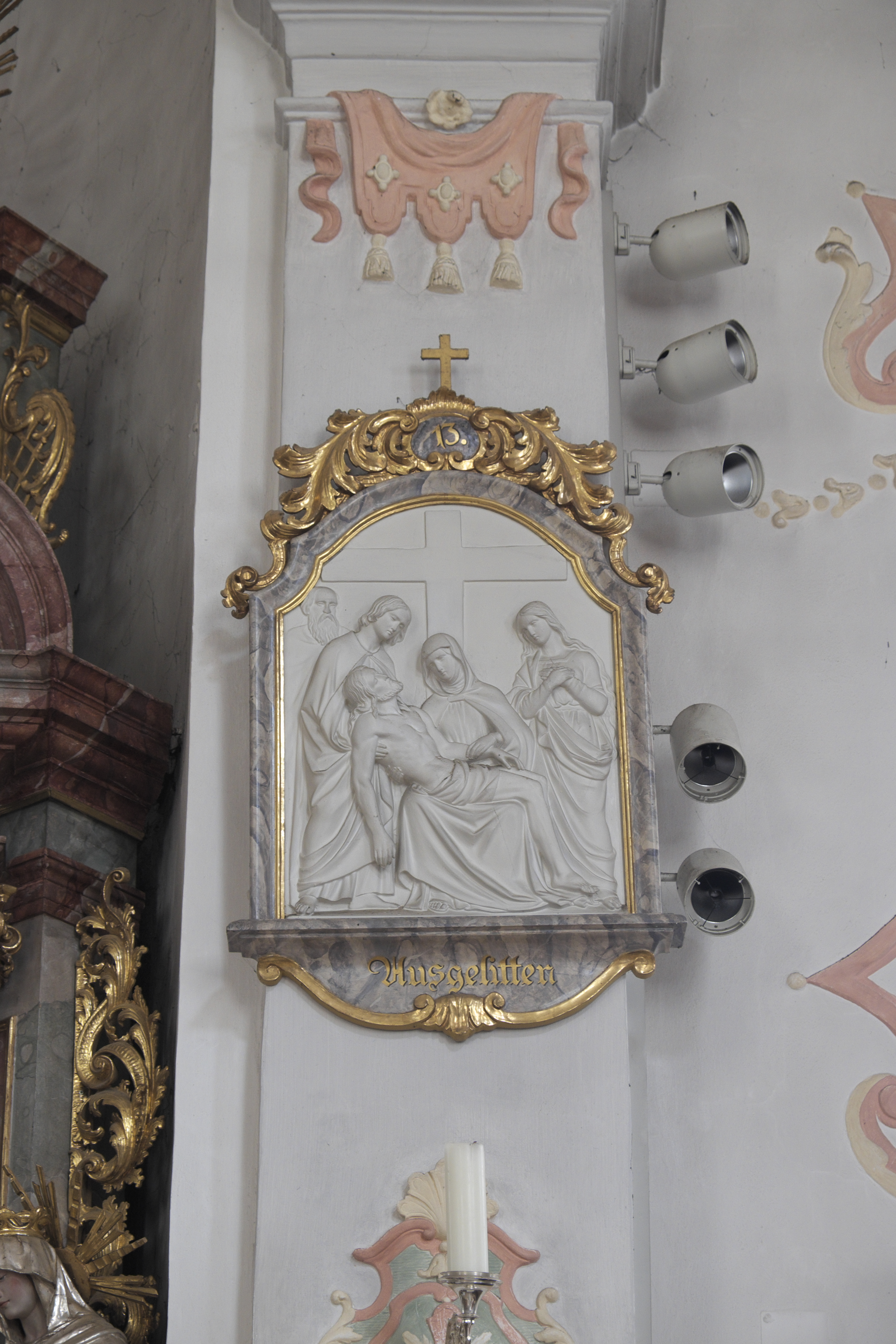 Katholische Pfarrkirche St. Johann Baptist in Riedenburg im niederbayerischen Landkreis Kelheim (Bayern/Deutschland), Kreuzwegrelief